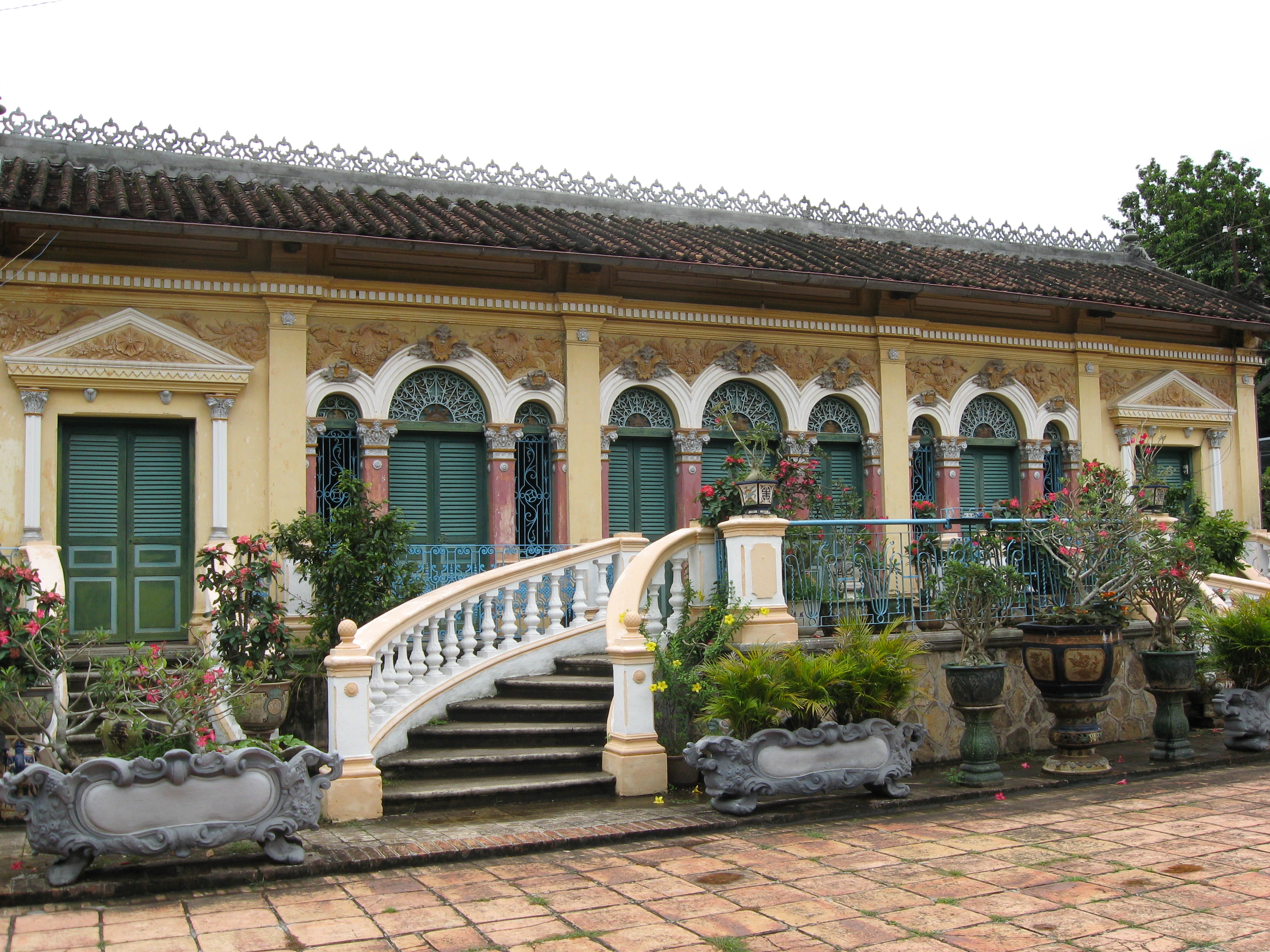 La maison ancienne Binh Thuy, Can Tho